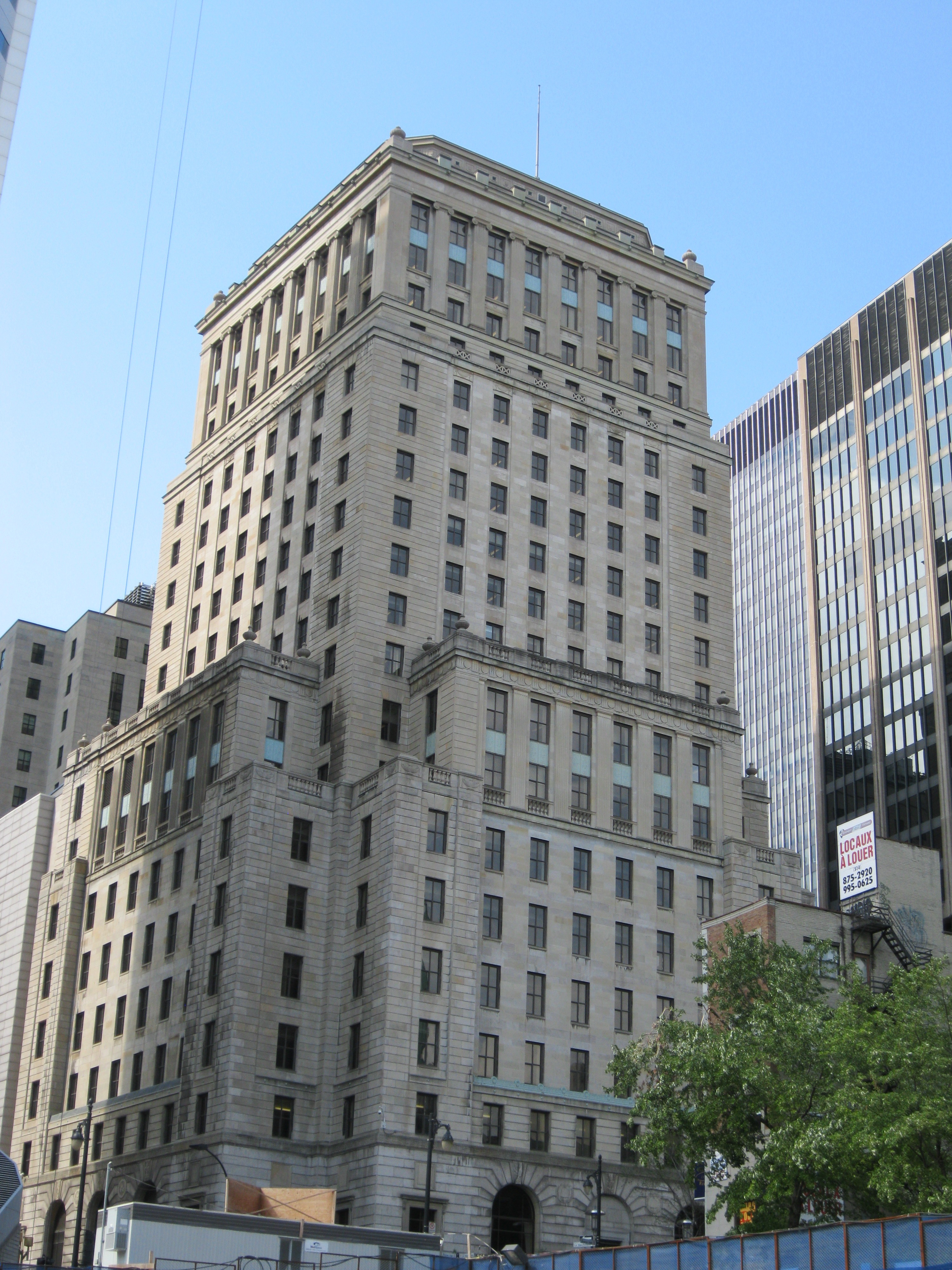 Édifice de Bell, 1050 Côte du Beaver Hall, Montréal